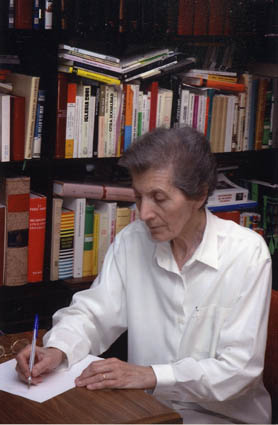 Manolita Espinosa, imagen mural que hay en Biblioteca Municipal de Almagro